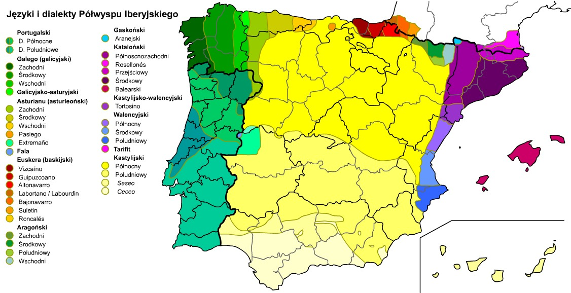 Języki i dialekty Półwyspu Iberyjskiego (Hiszpanii i Portugalii).